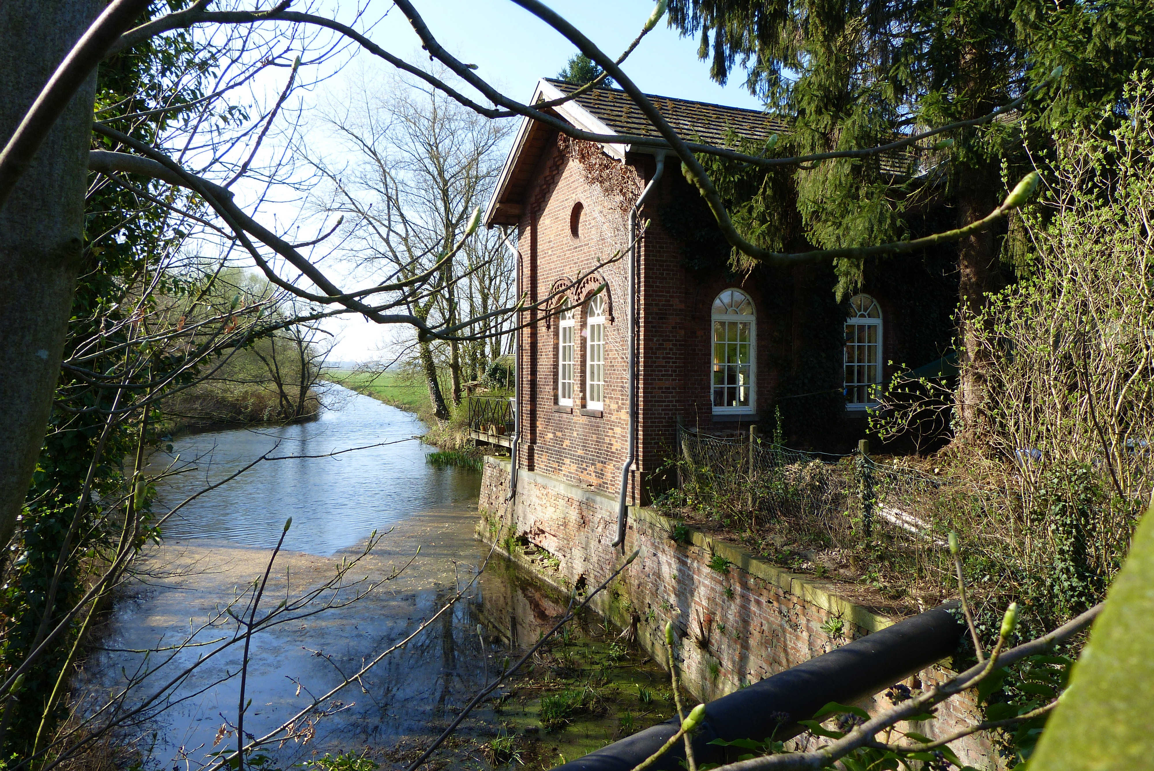 Schöpfwerk Lesumbrok, Pumpenhaus, Dampfentwässerungsanstalt Lesumbrok, Abwässerungsanstalt Lesumbrok, Lesumbroker Sielgraben in Bremen, Lesumbroker Landstraße 122Blick aus nordöstlicher Richtung.Das abgebildete Objekt ist ein geschütztes Kulturdenkmal in der Freien Hansestadt Bremen, mit der Nr. 2430 beim Landesamt für Denkmalpflege registriert.